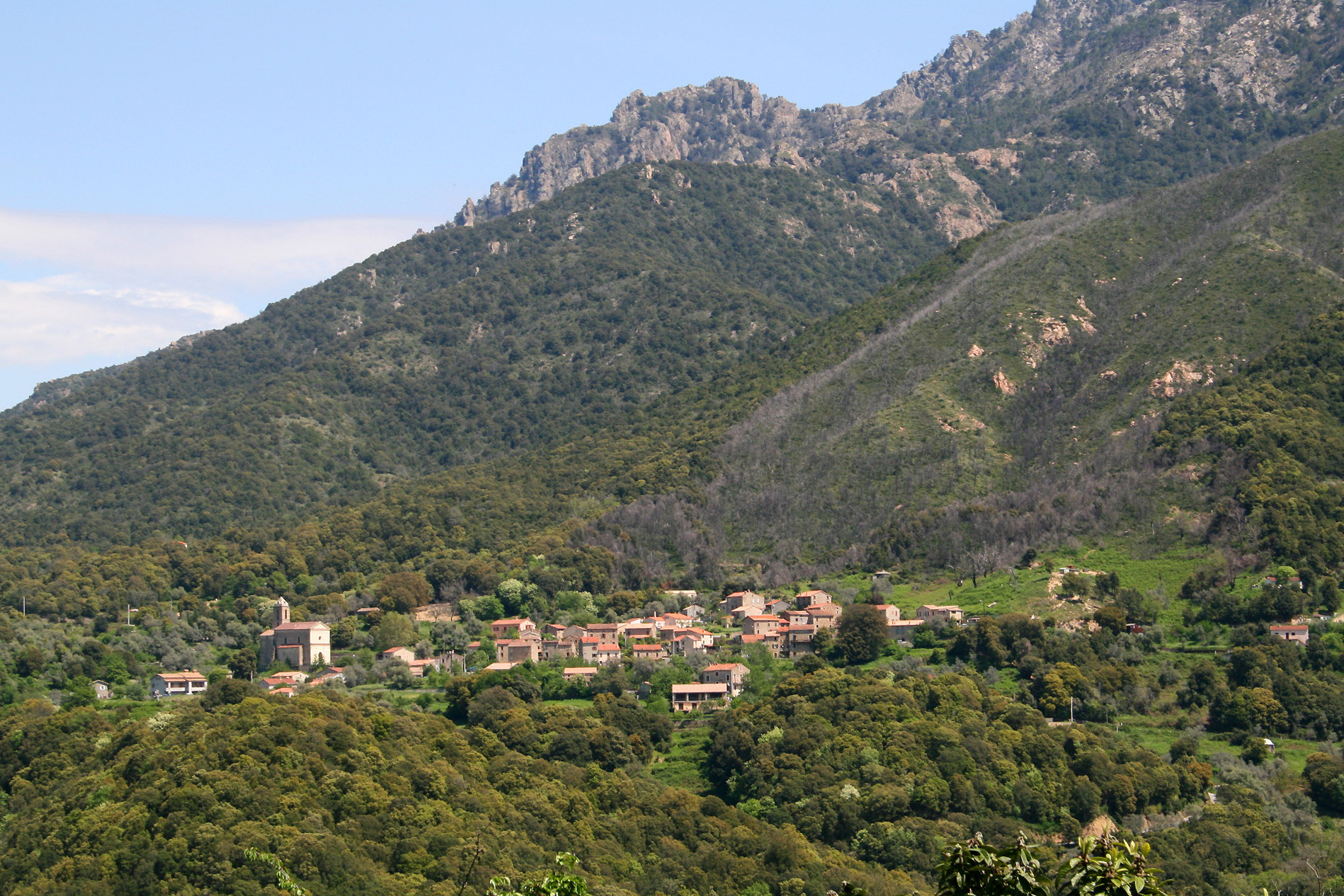 Murzo France - ( Corse du Sud), le village. Corsu: Murzu Francia (Corsica suttana), u paese Walon: Murzo France (Corse do Sud), li viyadje.